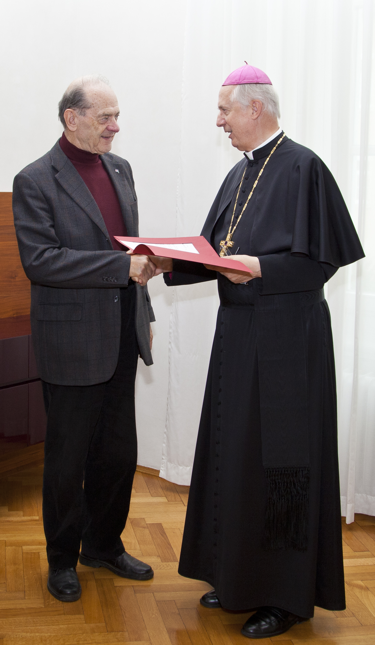 Dekretüberreichung an Univ.-Prof. Dr. Philipp Harnoncourt durch Bischof Dr. Egon Kapellari, 11. Oktober 2011